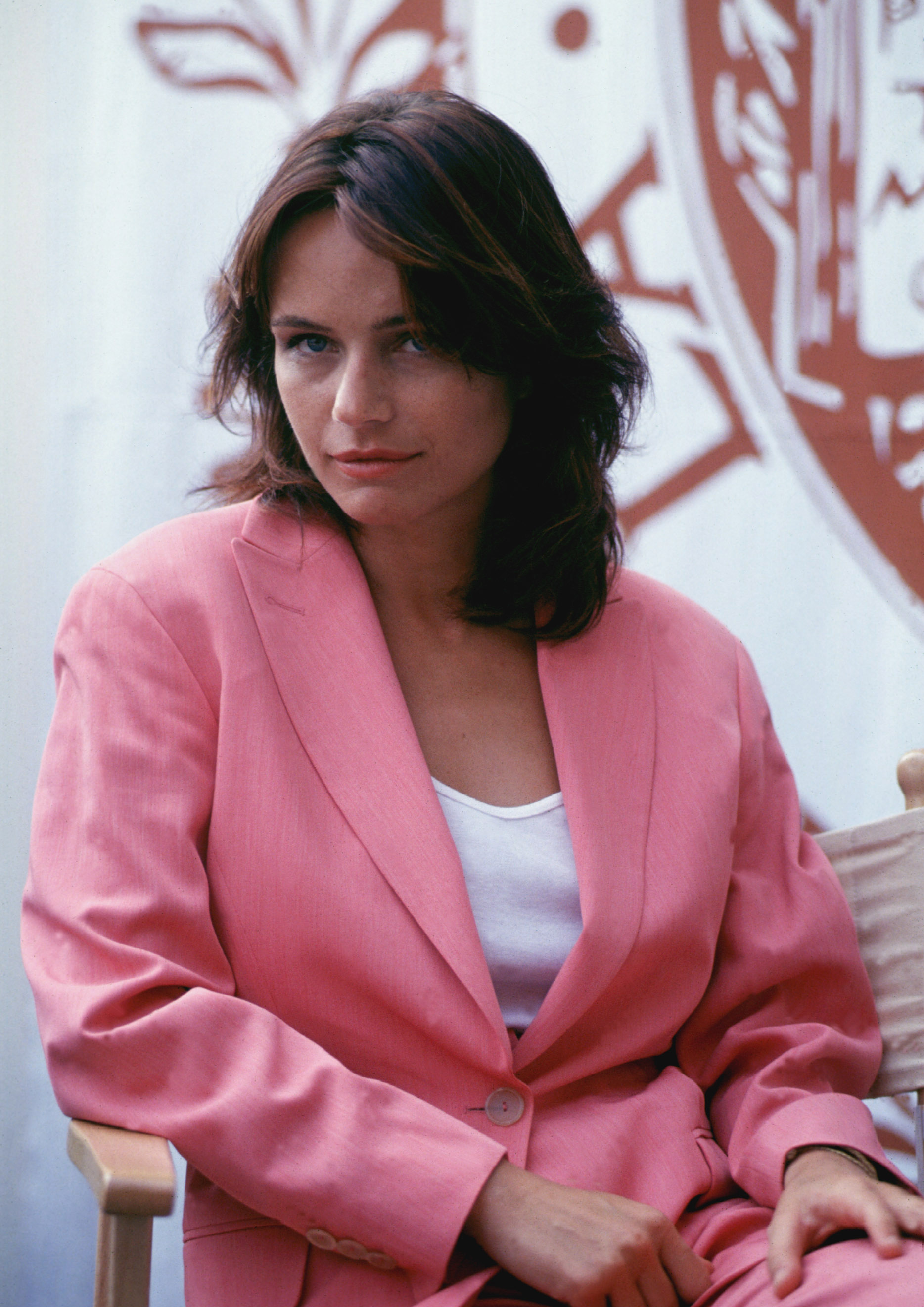 L'attrice Francesca Neri alla Mostra del cinema di Venezia del 1990